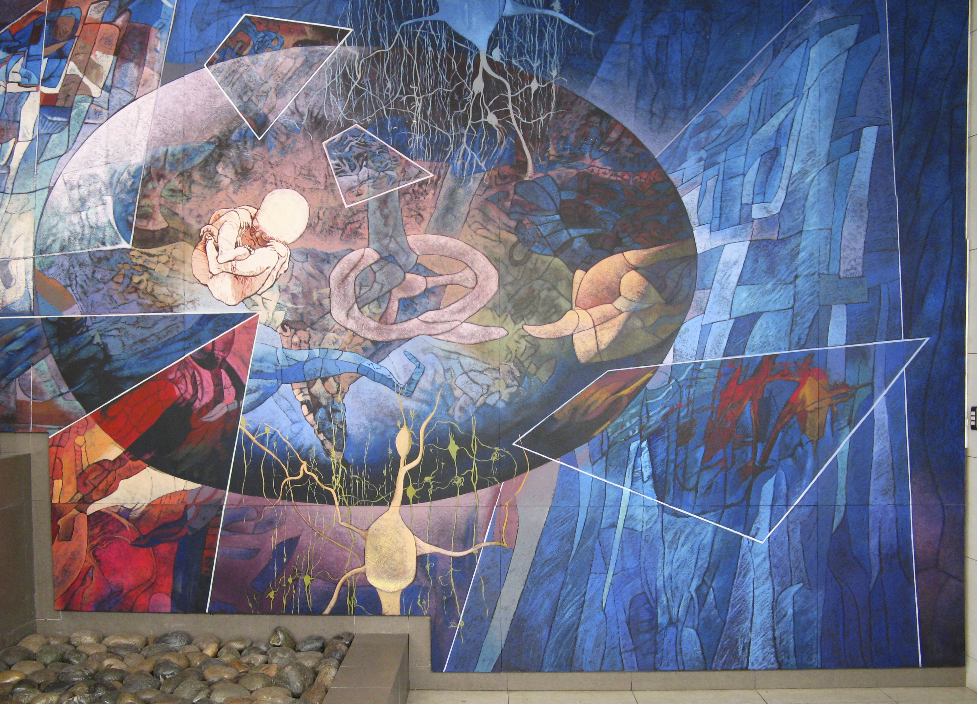 Mural "Educación: pasado, presente y futuro" (2009) de Marco Antonio Hernández Albarrán. Detalle del interior Concepción, Chile. Agosto de 2012.